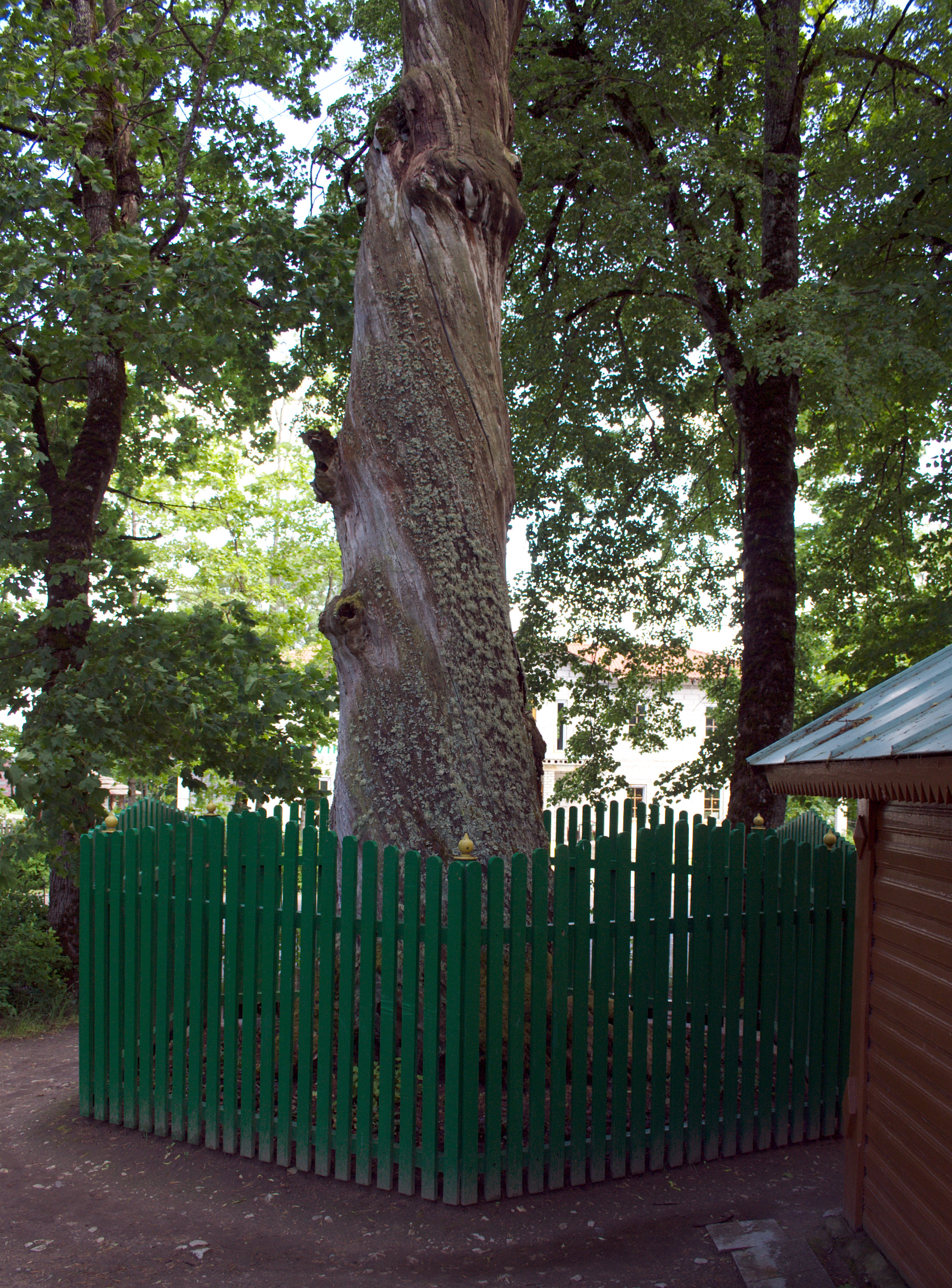 Püha tamm